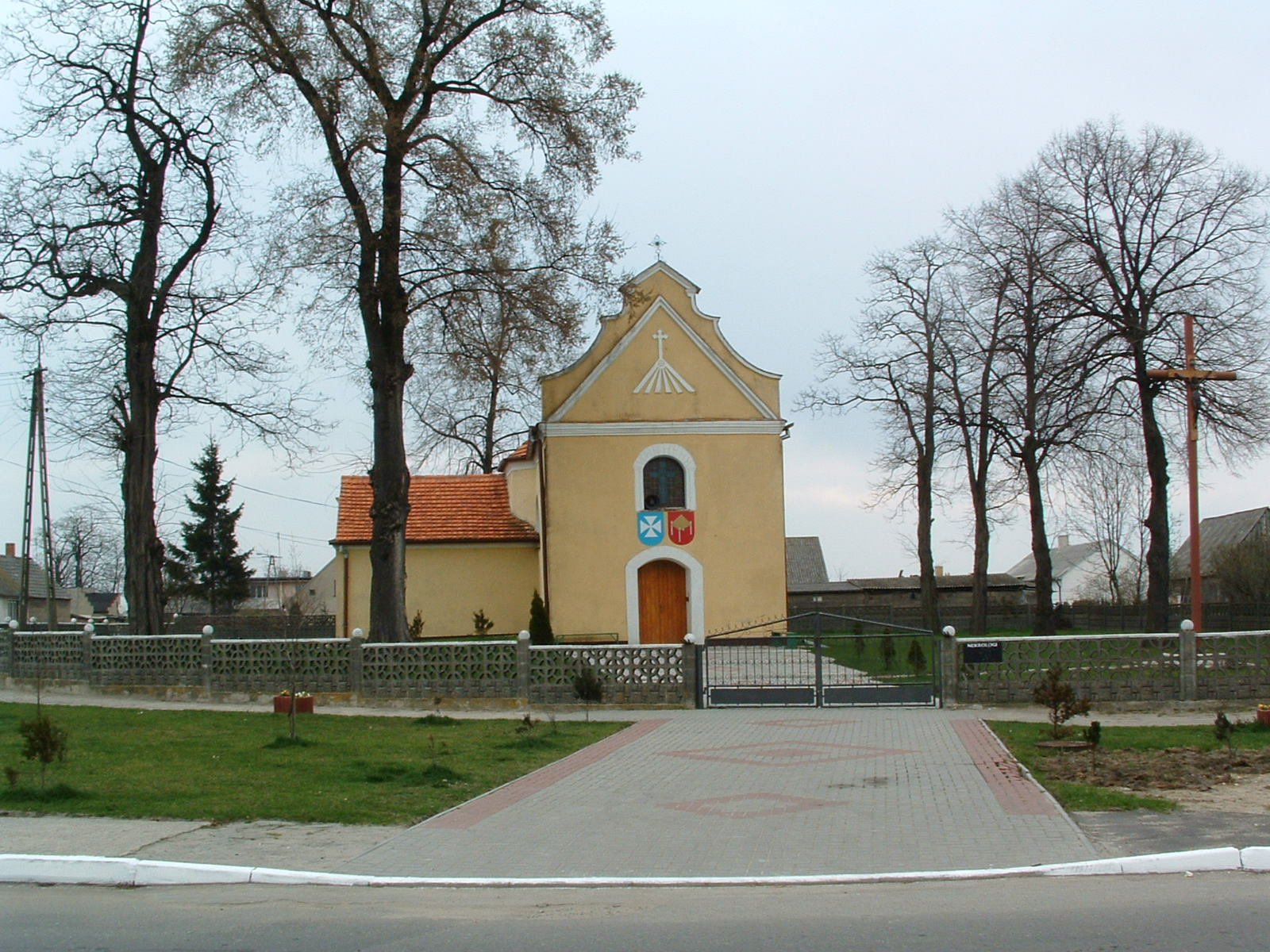 Kaplica pogrzebowa p.w. Ducha Świętego w Brudzewie